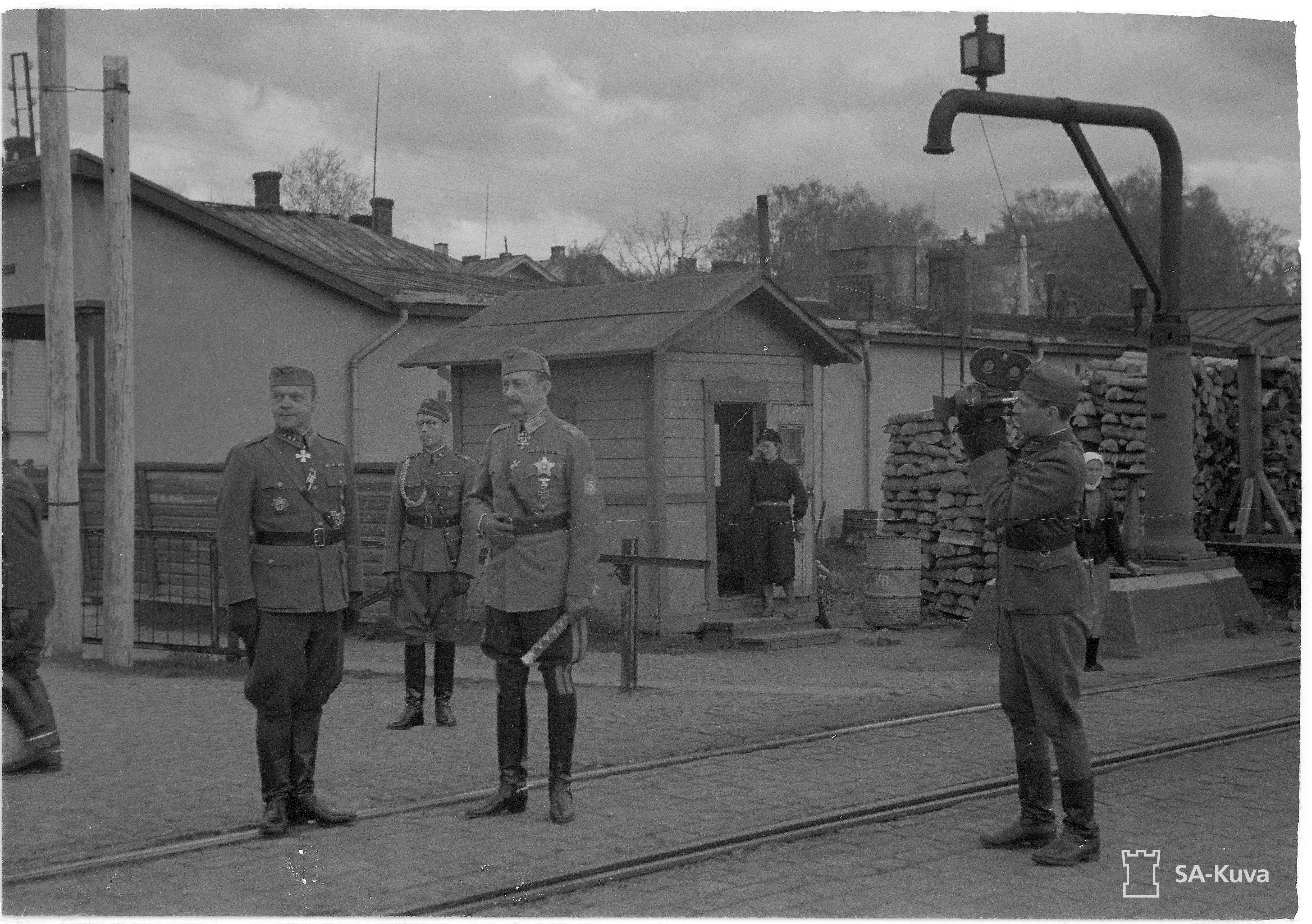 Tk-valokuvaaja F.Forsman kuvaa Marskia ja kenraali Heinrichsiä, heidn odotellessa Mikkelin asemalla Tasavallan presidentin junan saapumista.